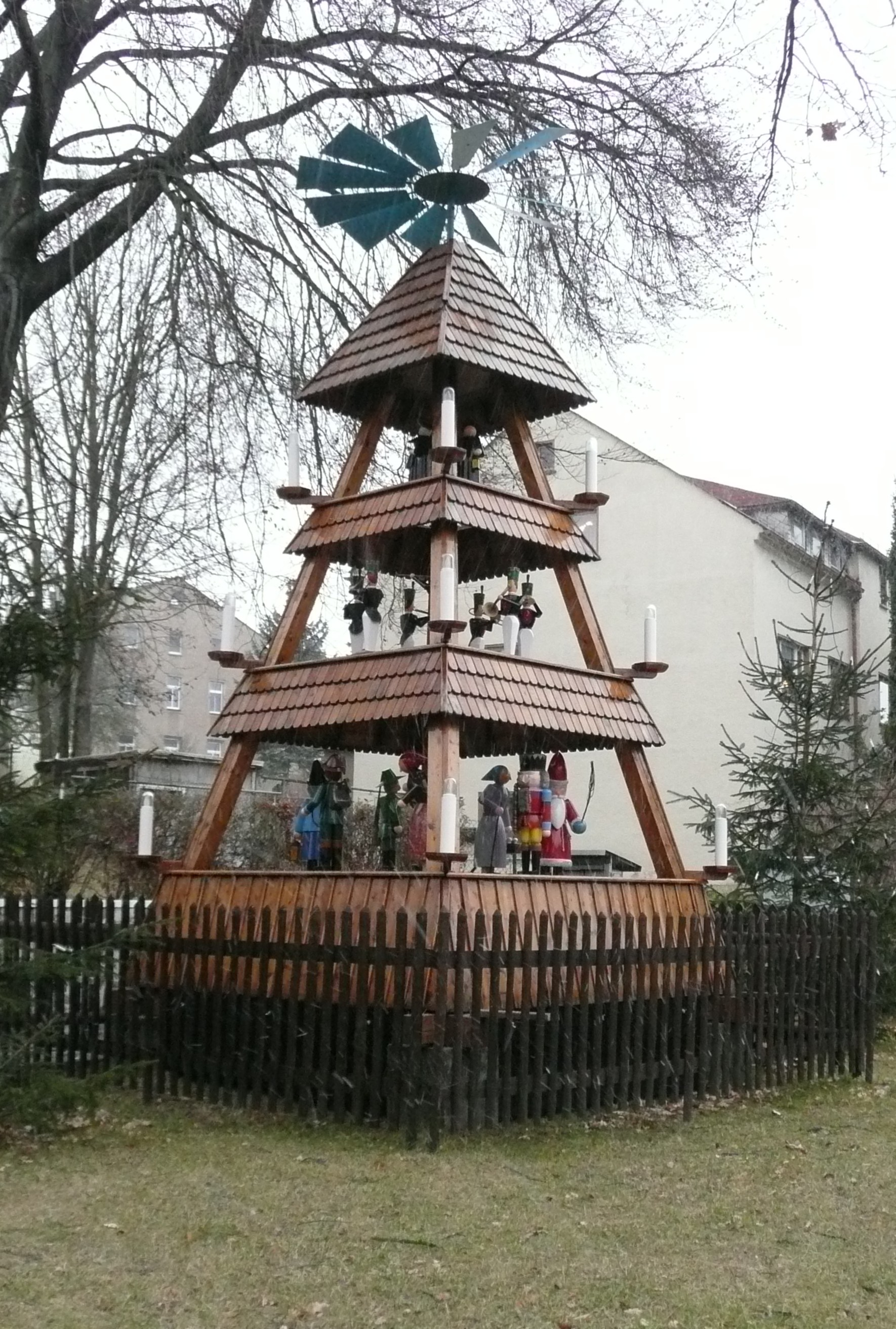 Die Ortspyramide Eppendorf (in Sachsen) von 1969 am Albertplatz